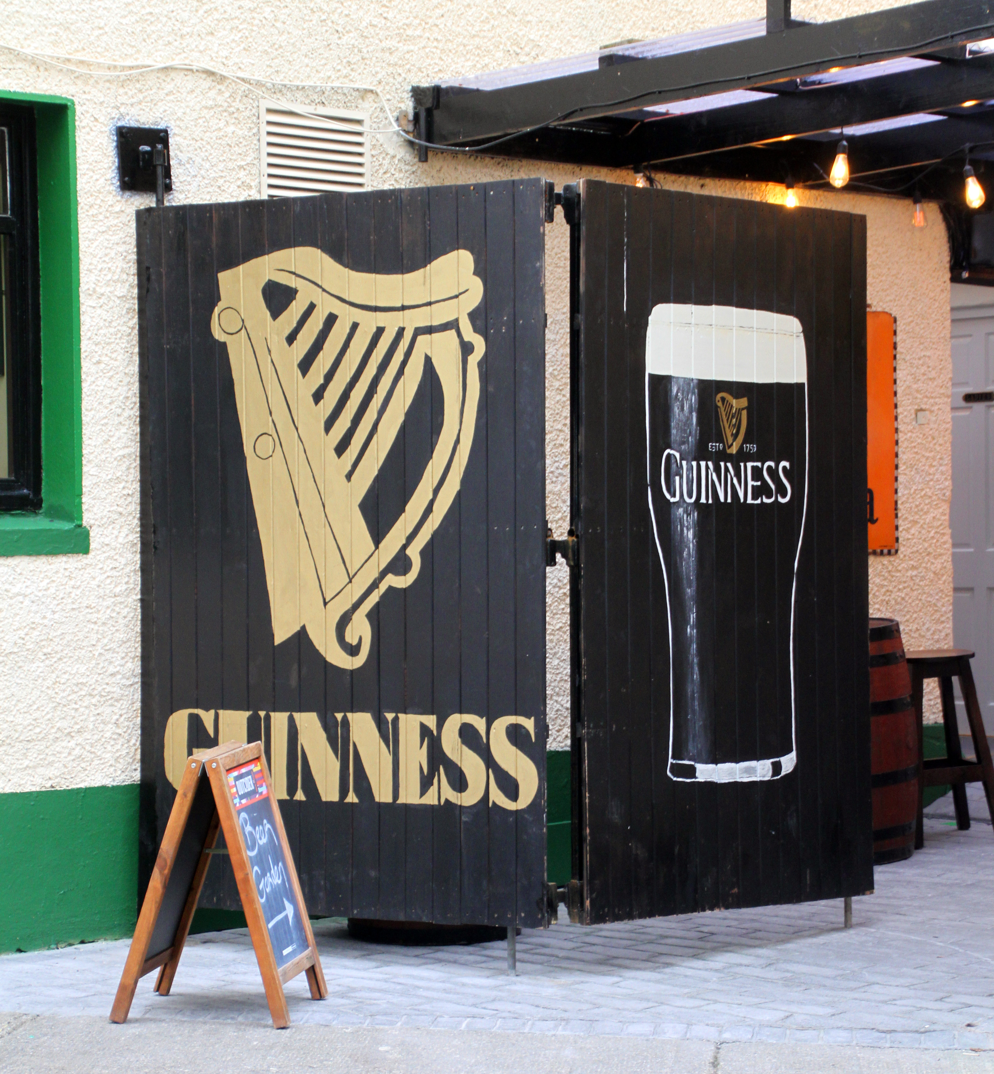 Donegal-Guinness-Harfe